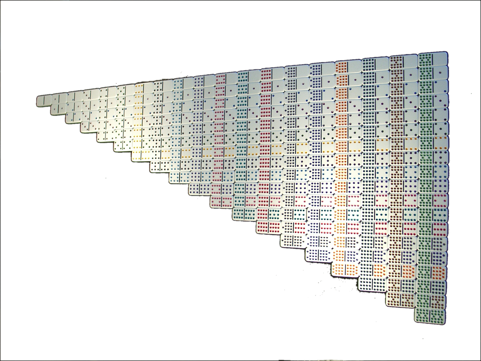 dominoes double-18 Domino Doppel-18